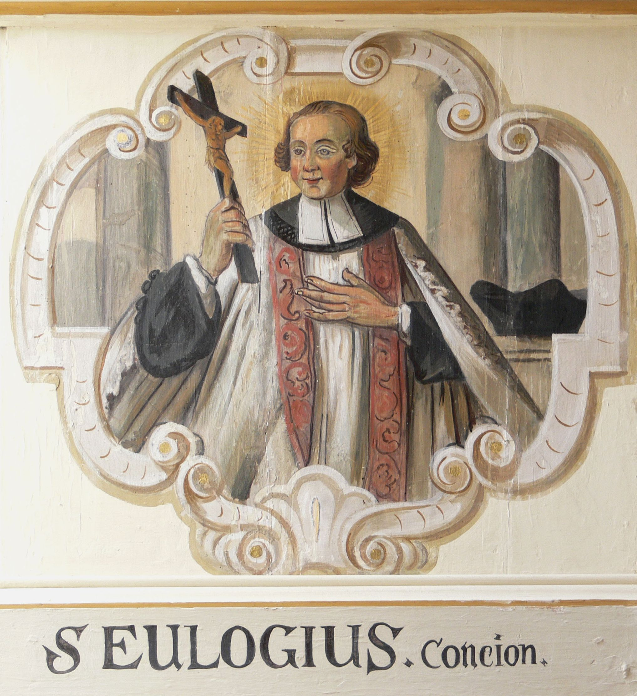 Stiftskirche Heilig Kreuz, Horb am Neckar Orgelempore (evtl. von Anton Hermann, 1781-1782): Hl. Eulogius von Córdoba († 859) im Gewand der Horber Stiftsprediger